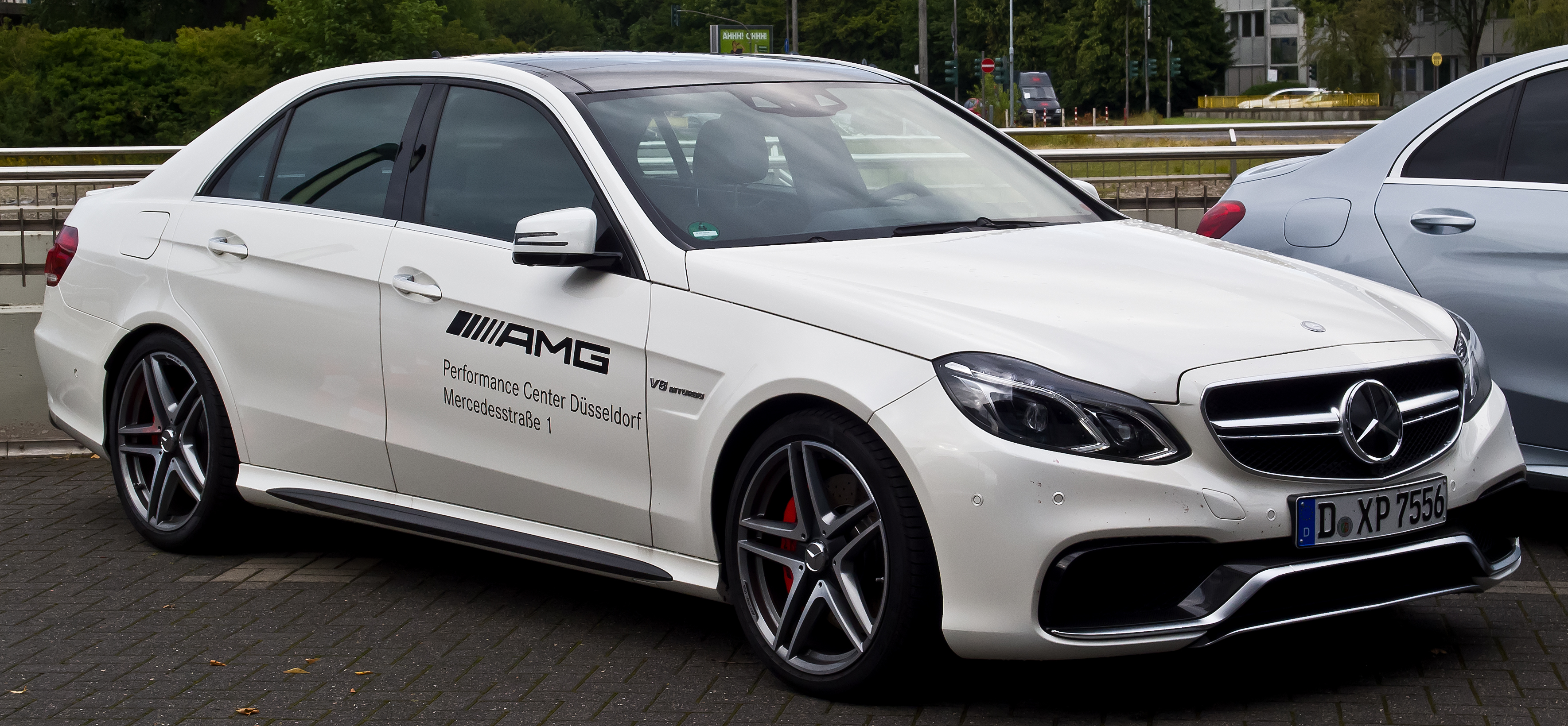 Mercedes-Benz E 63 AMG S 4MATIC (W 212, Facelift)